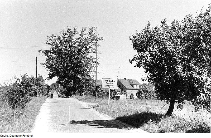 Original image description from the Deutsche Fotothek Wunscha. Ehem. Mühle, rechts hinter dem Ortsschild